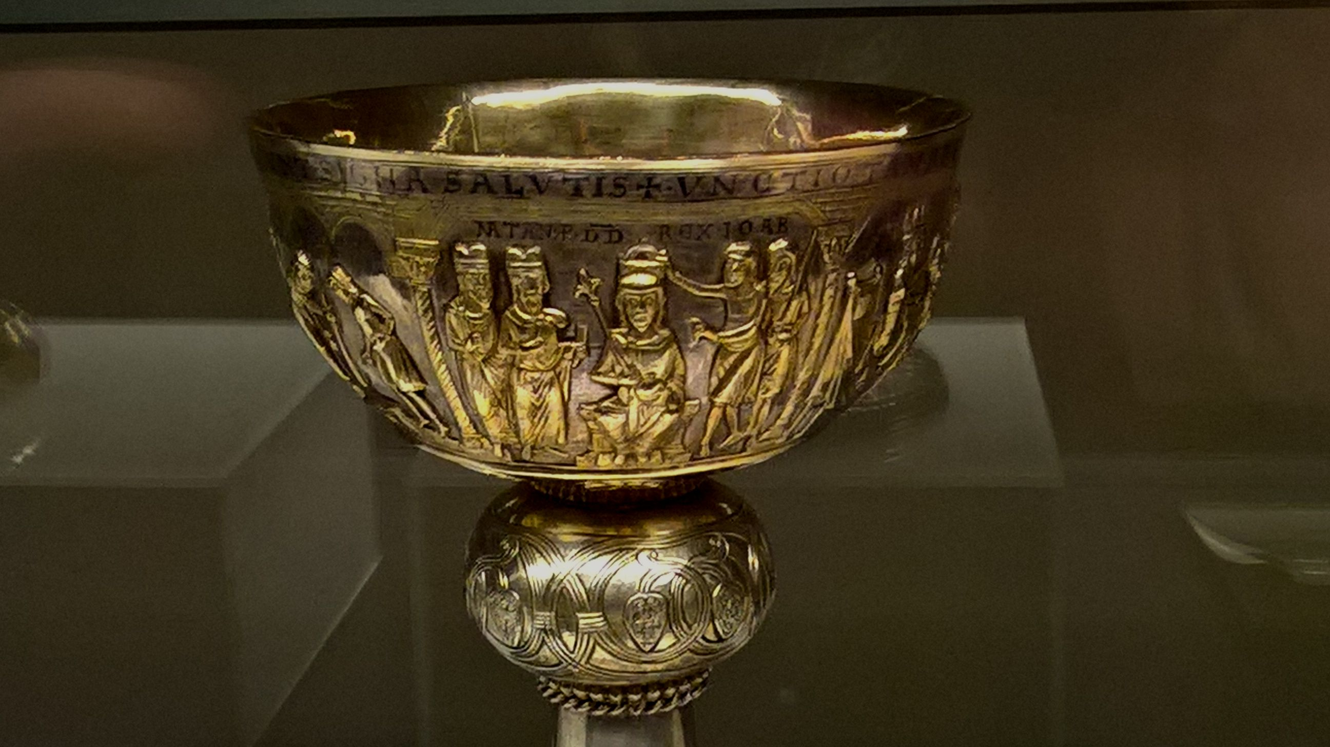 Kielich królewski (kielich tzw. królewski z Trzemeszna, in. II kielich Dąbrówki). Kolekcja Muzeum Archidezji Gnieźnieńskiej. Wystawa Primas Poloniae zorganizowana z okazji 600-lecia prymasostwa w Polsce. Gniezno, 23 kwietnia 2017 r.